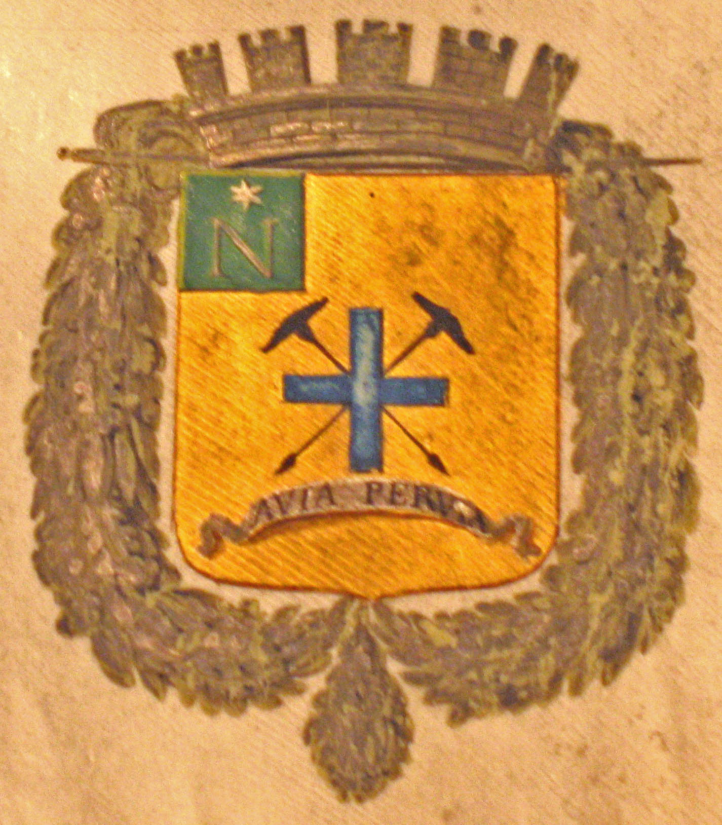 Stemma napoleonico di Modena concesso con decreto del 9 gennaio 1813: «Porta d'oro con una croce d'azzurro accollata di due trivelle di nero passate in saltiere, ed una lista piegata in giro, ed attortigliate nella punta d'argento, caricata del motto di nero - Avia Pervia -. Col cantone franco destro di verde alla lettera N d'argento, sormontata da una stella del medesimo: Cimato dalla corona murale a cinque merli d'argento, accollata da un caduceo del medesimo posto in fascia. Il tutto accompagnato da due festoni intrecciati d'ulivo e di quercie della Corona, divisi tra i due fianchi dello Scudo, ricongiunti e pendenti dalla punta».